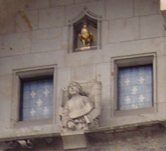 DescriÃ§Ã£o: Portas dos apÃ³stolos e galo do relÃ³gio Orloj Fonte/CrÃ©ditos: Arquivo pessoal de JoÃ£o Daniel Piccino LicenÃ§a: ' (Consulta Copyright e direitos autorais) AtenÃ§Ã£o: Somente imagens livres para qualquer uso, sem restriÃ§Ã£o, sÃ£o aceitas!